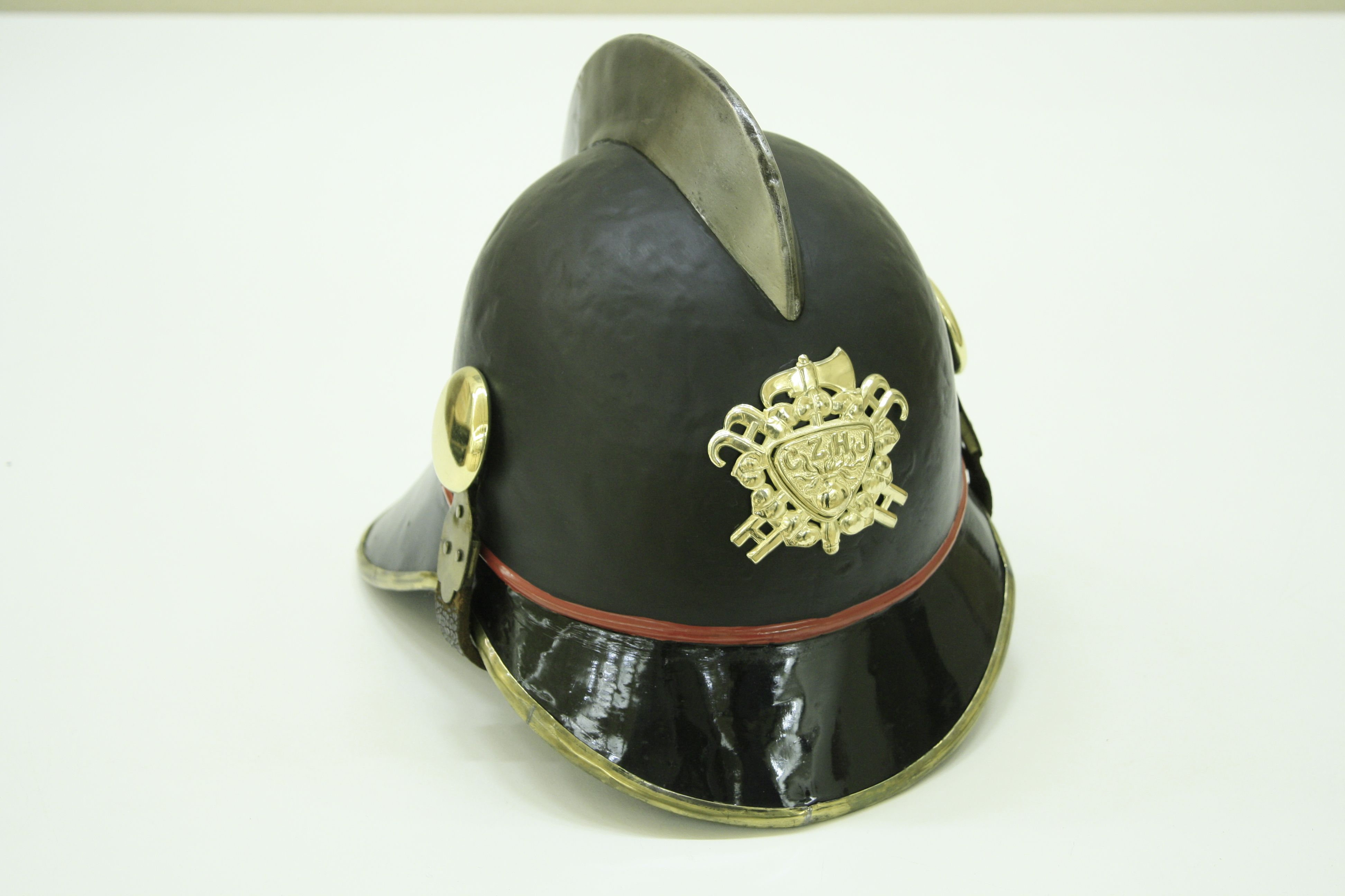 Tschechischer Feuerwehrhelm (Mannschaft) von ca. 1875 im Feuerwehrmuseum Perchtoldsdorf in Niederösterreich